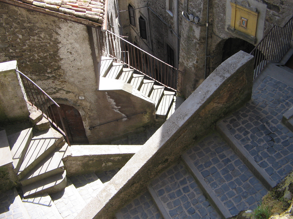 san vito romano, Lazio, Italia